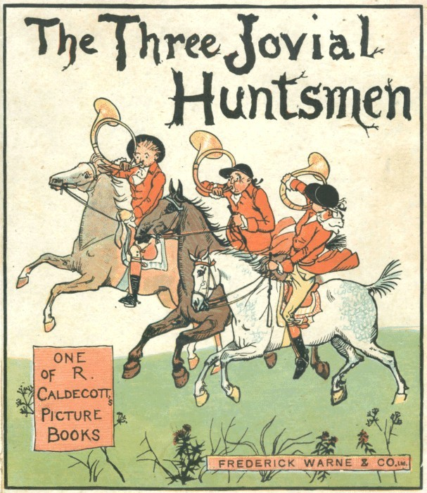 Titelseite The Three Jovial Huntsmen (Die drei fröhlichen Jäger) gezeichnet von Randolph Caldecott